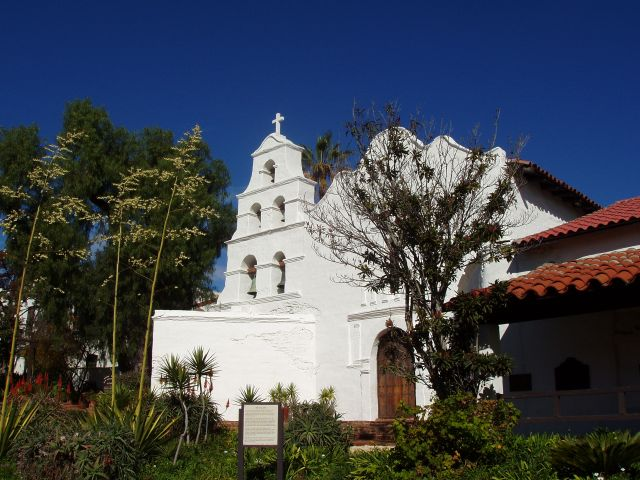 Mission San Diego de Alcala